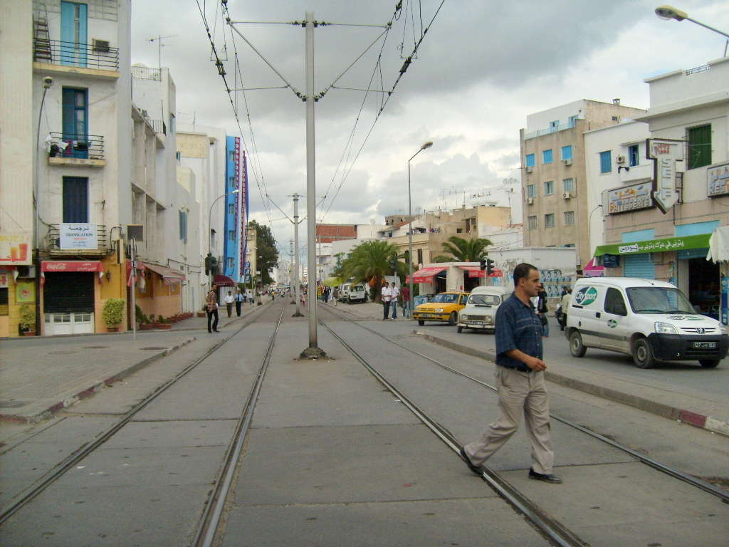 Voies du métro léger de Tunis sur l'avenue du Train